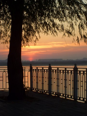 Рождественский парк в ЮМР,закат